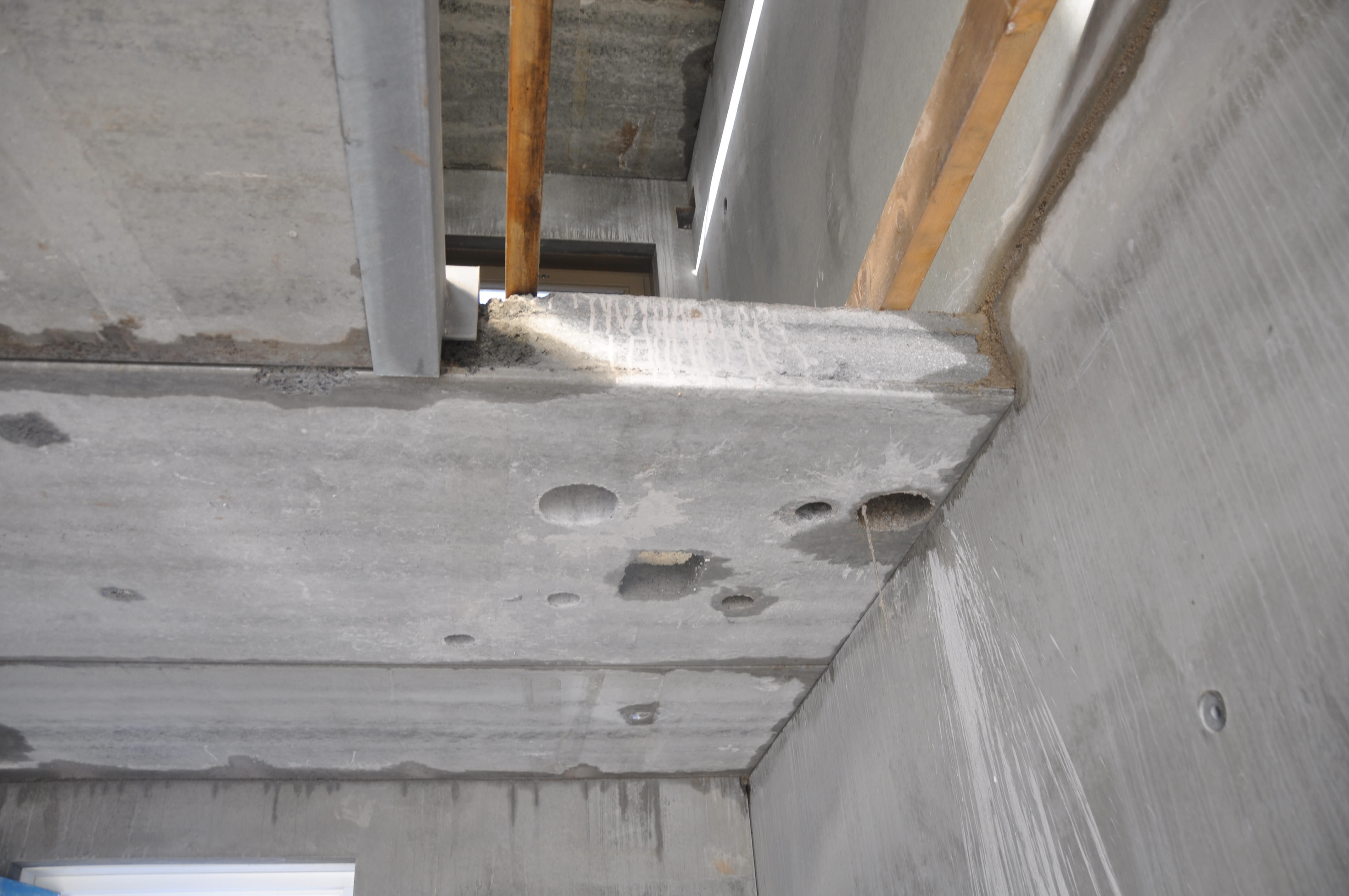 De Oosterscheldestraat in Berkel en Rodenrijs.